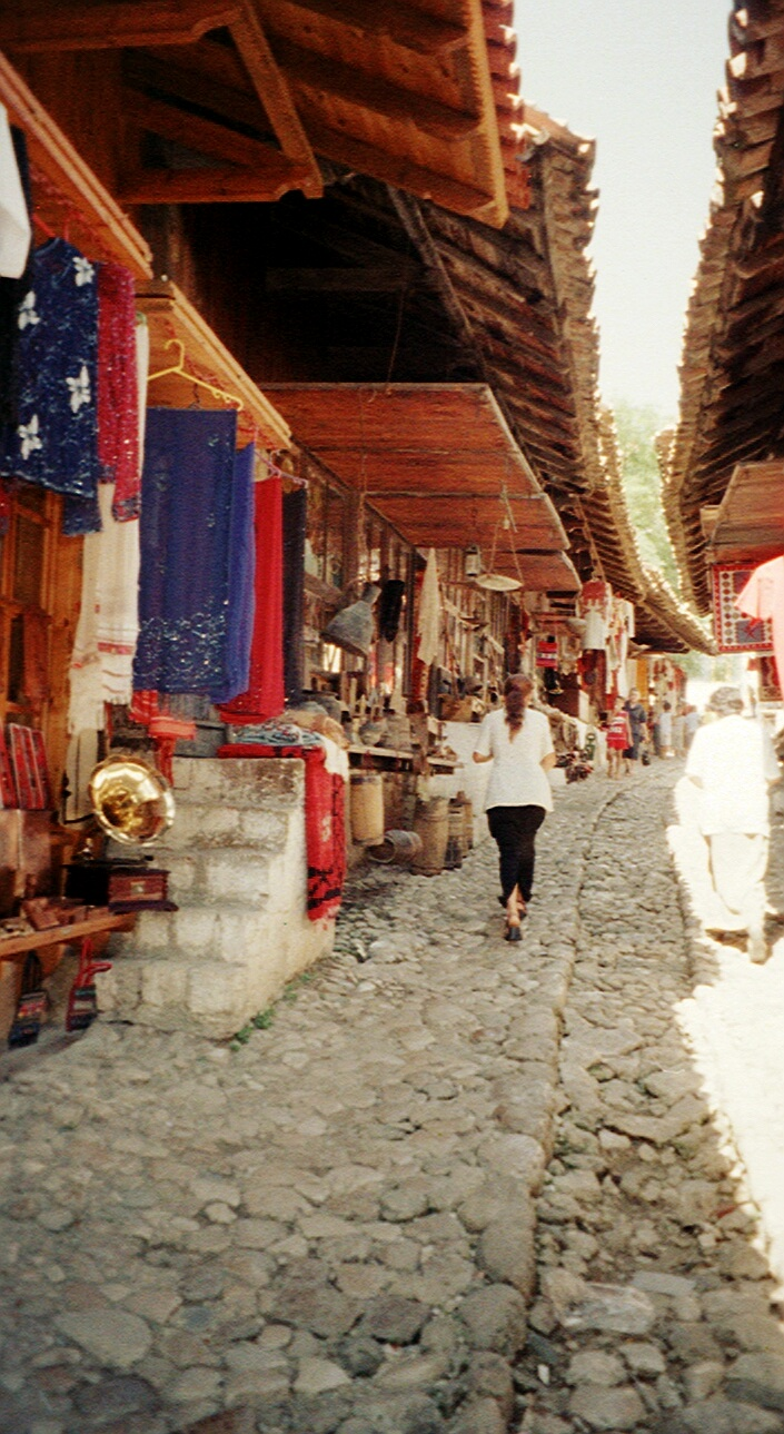 Kruje bazaar, personal photo taken in 2004